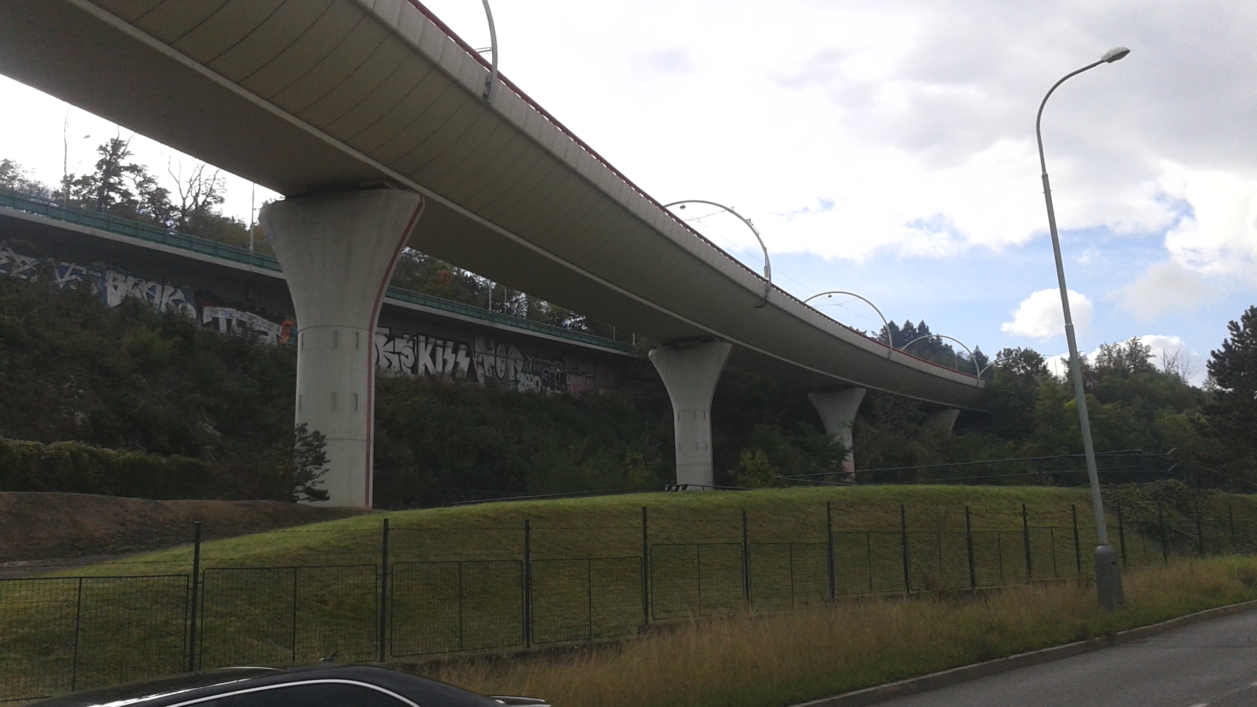 Tramvajový viadukt z Hlubočep k Barrandovu.